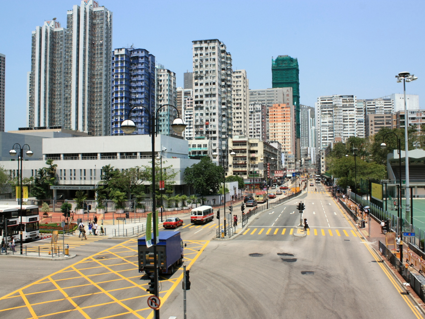 荃灣沙咀道 Sha Tsui Road